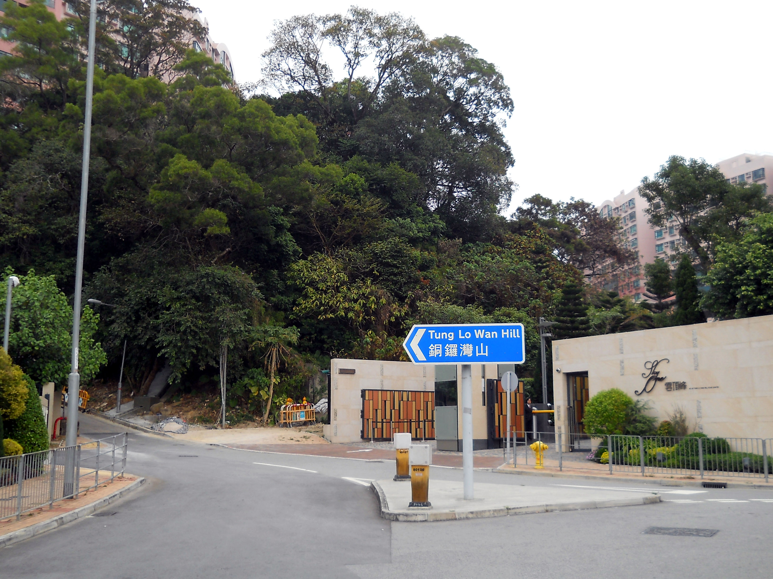 中文（香港）: 銅鑼灣山路牌